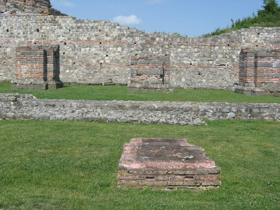 римска палата